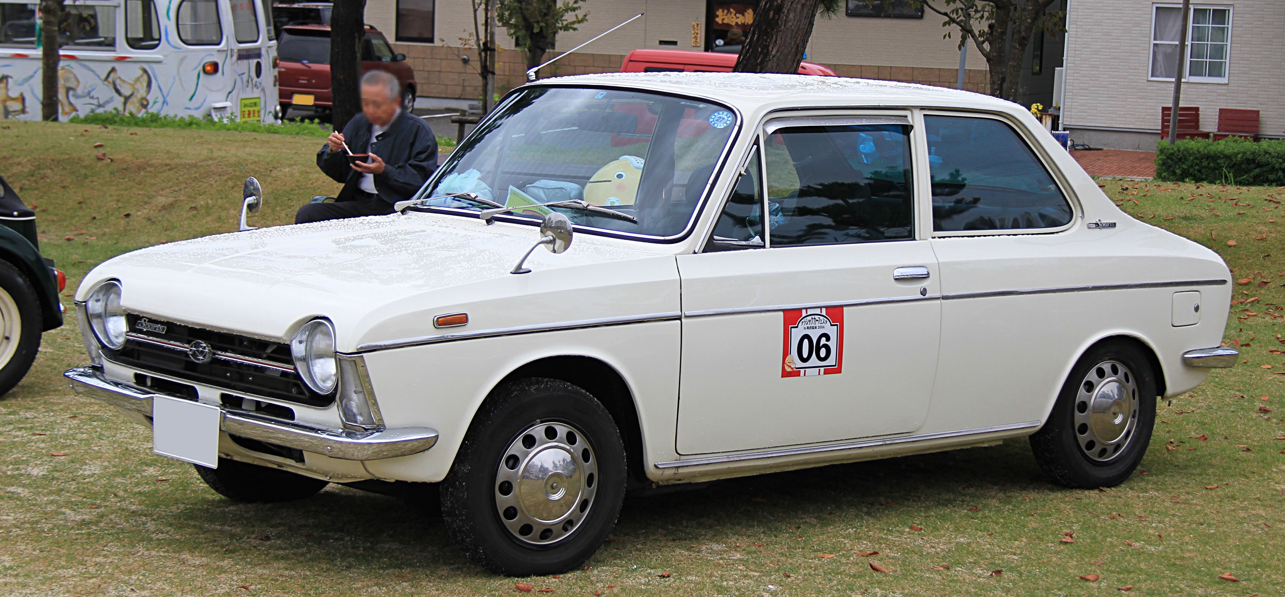 Subaru 1000